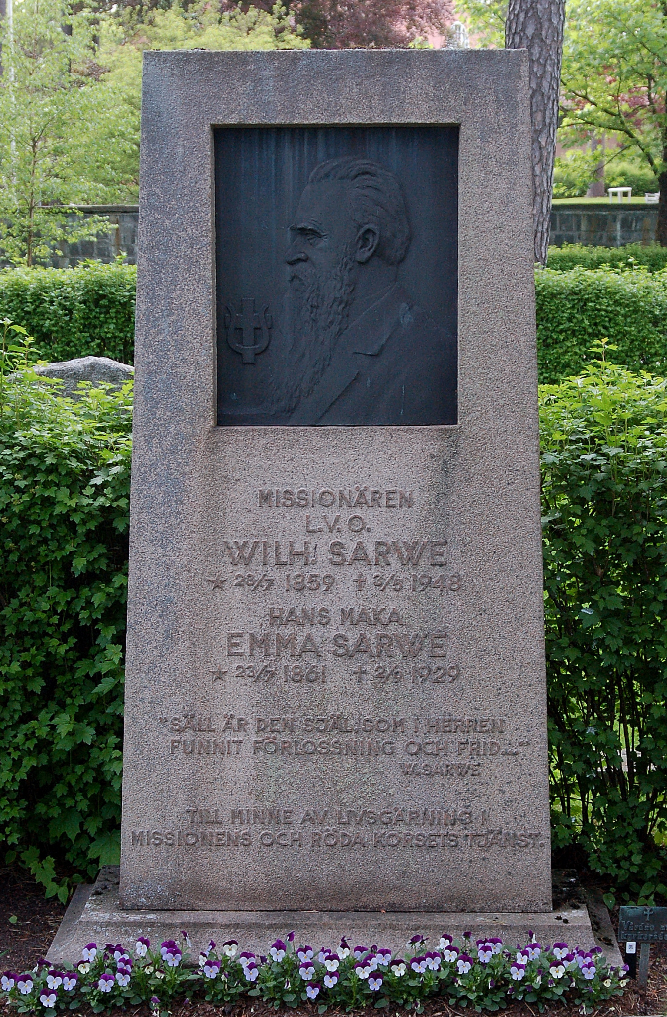 Foto av Wilhelm Sarwes gravsten på Degerfors kyrkogård. Wilhelm Sarwes headstone on Degerfors cemetery.